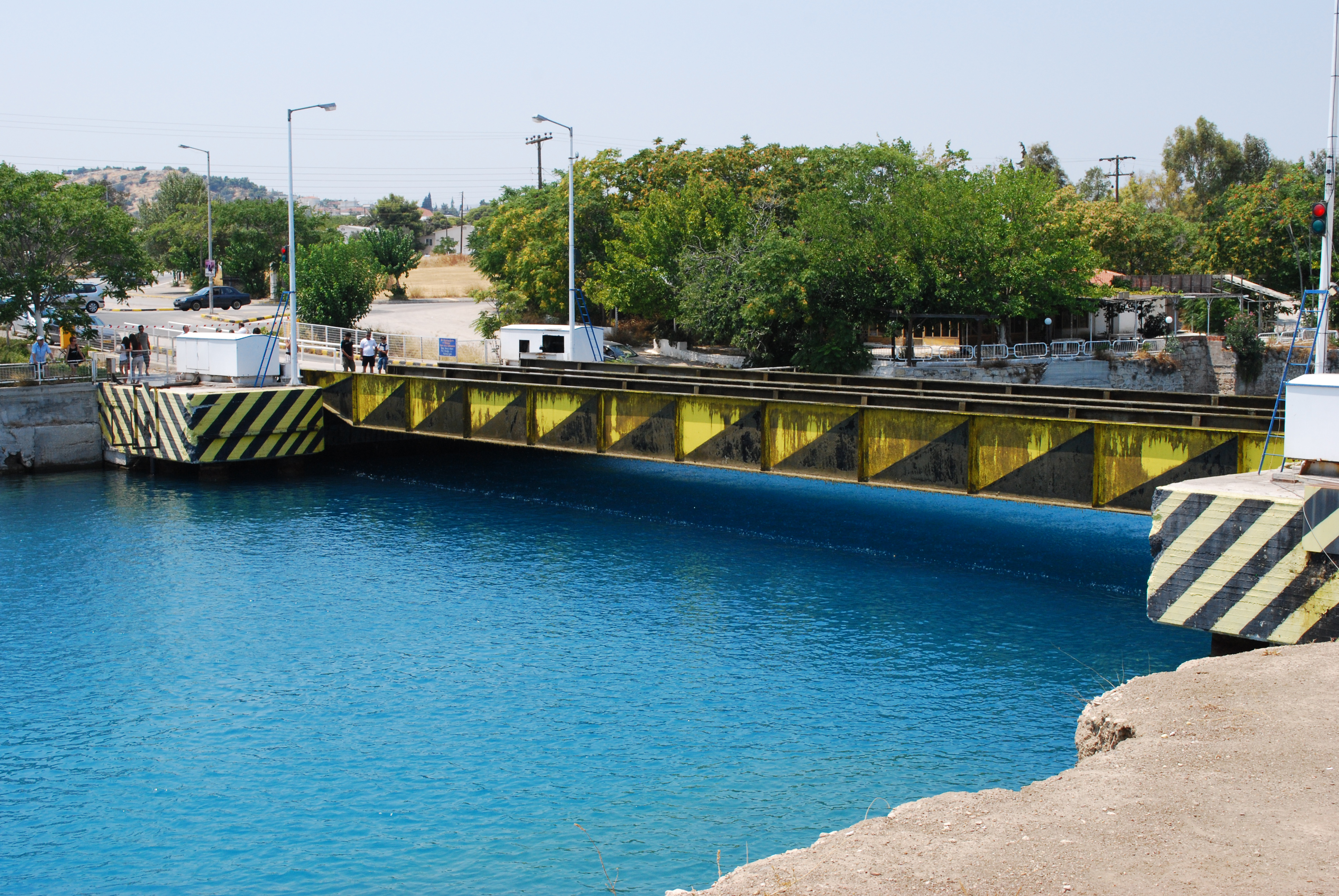 Le canal de Corinthe en Grèce en juillet 2009.